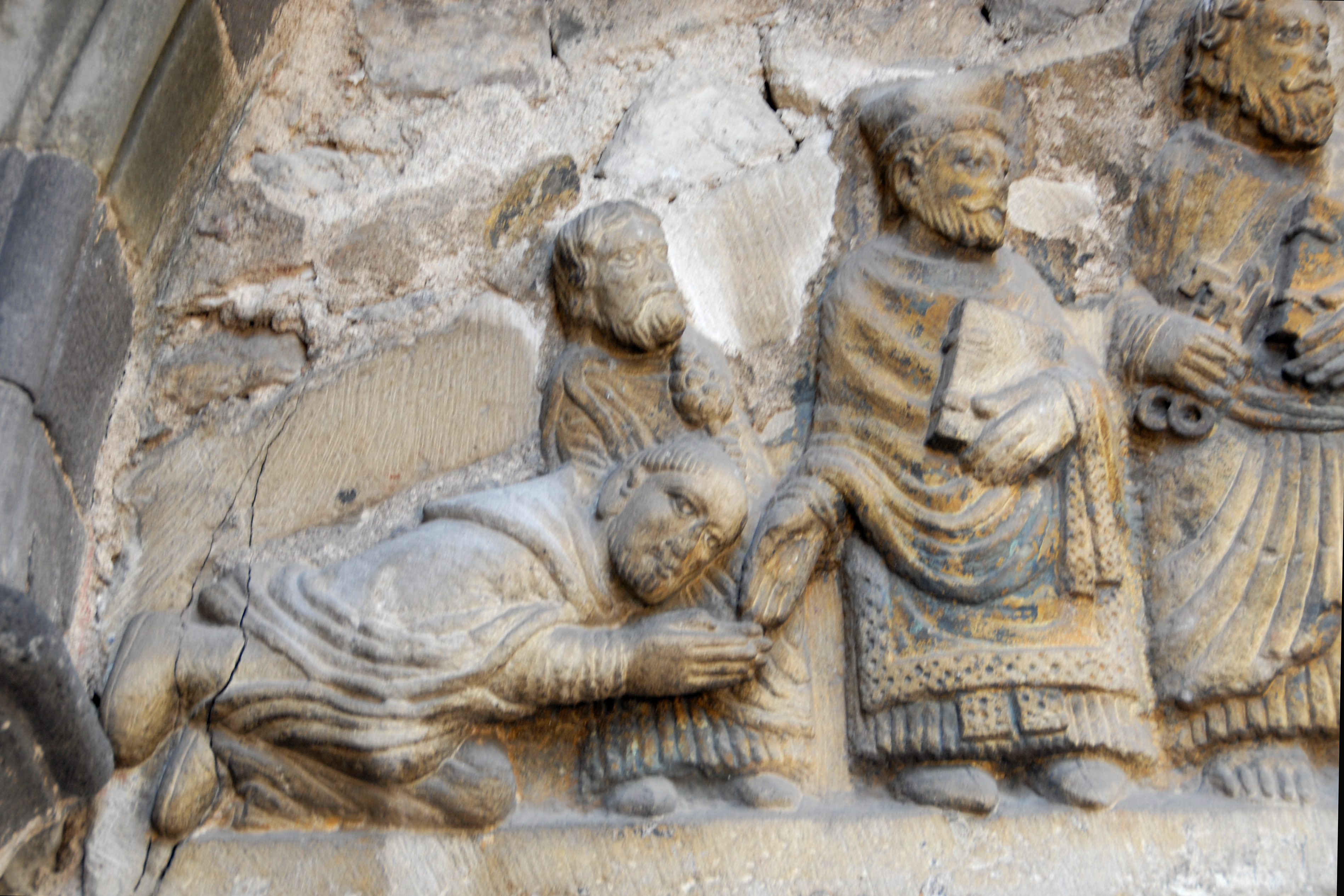 Mozat, südl. Querhaus, Portalsturz, links der Mitte